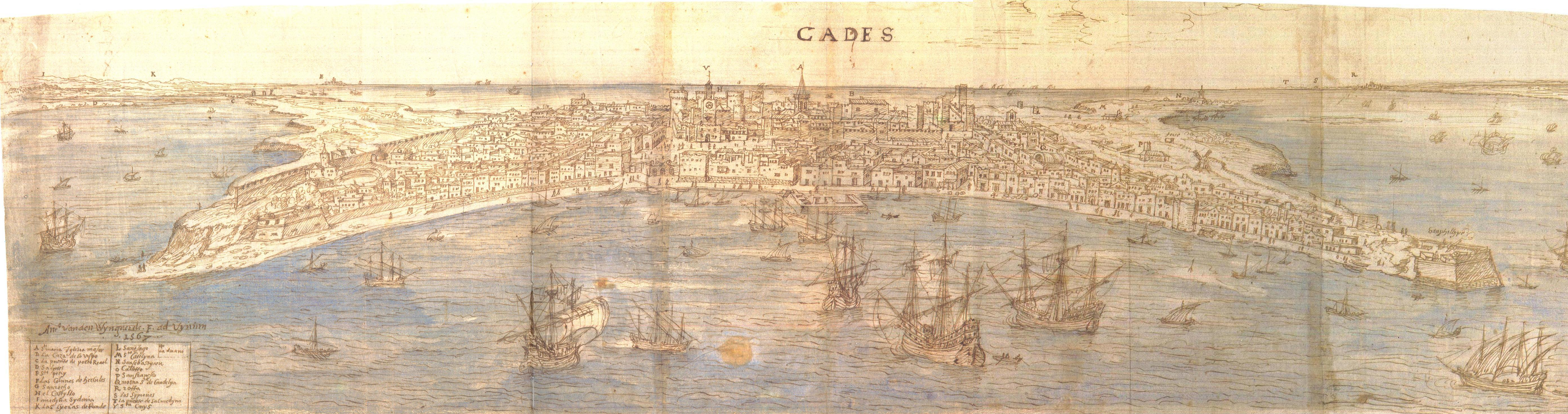 Vista de la ciudad de Cádiz, por Anthonis van den Wijngaerde (s. XVI).